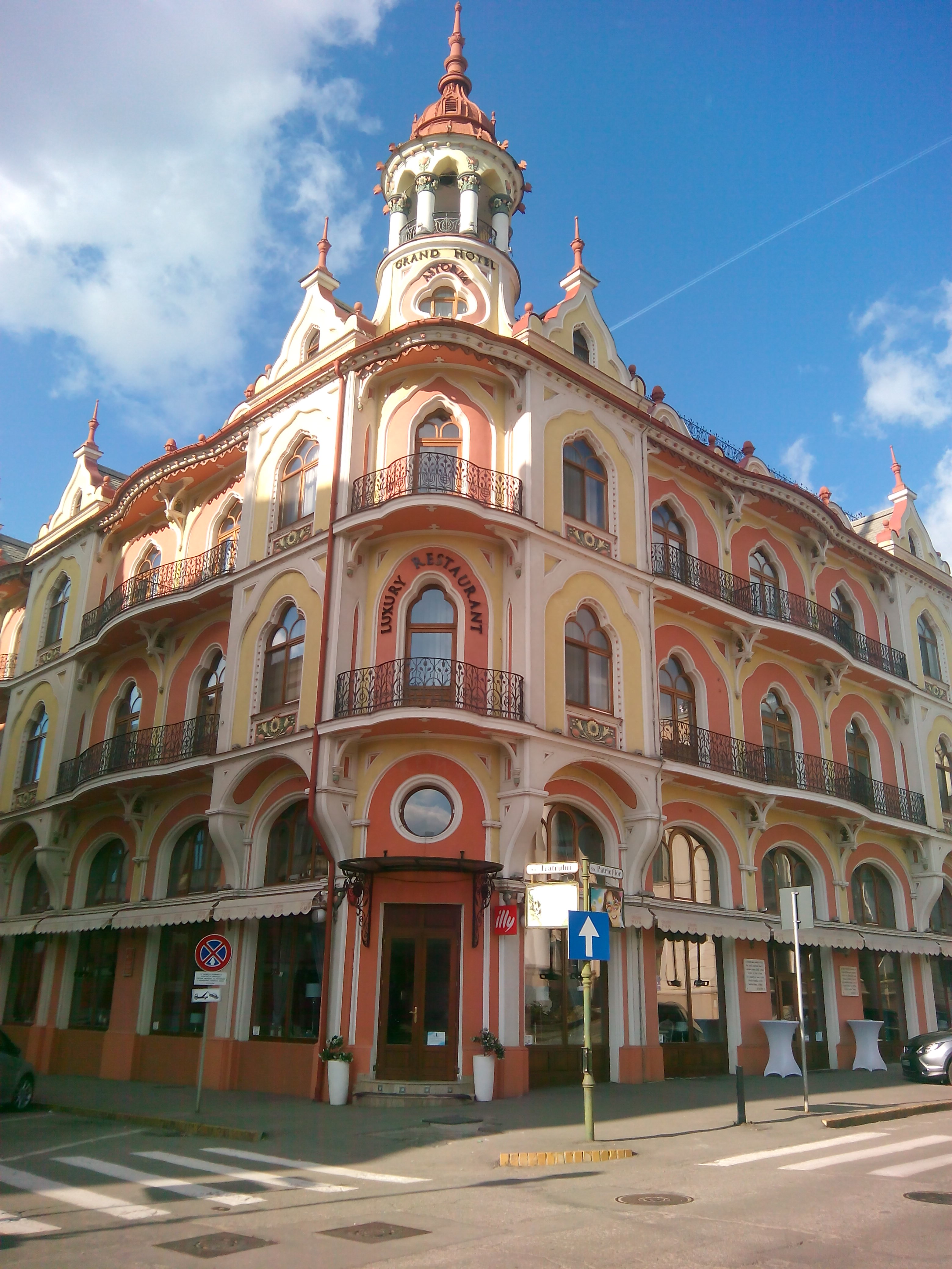 Az egykori EMKE-kávéház Nagyváradon